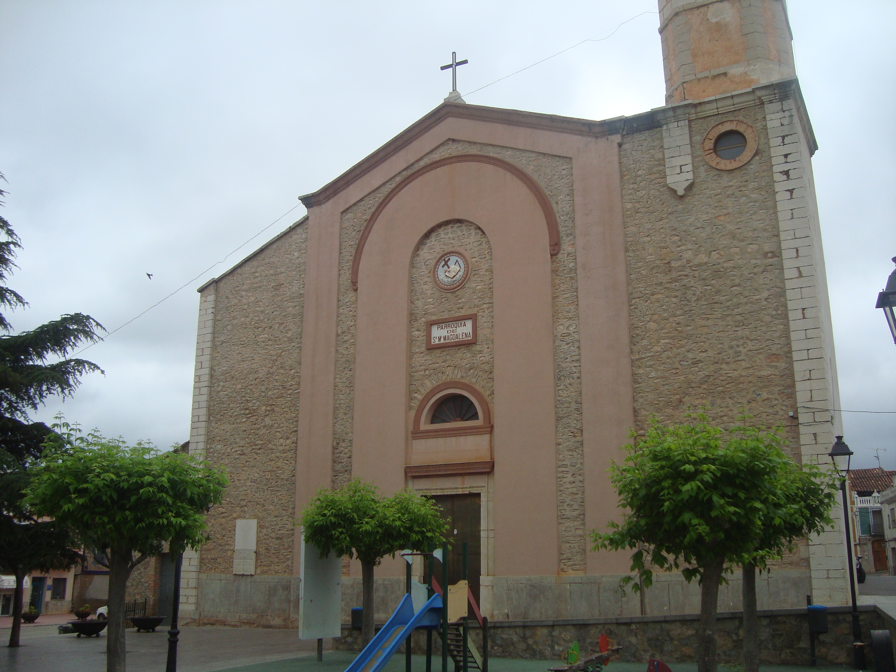 Església parroquial de Santa Magdalena (Santa Magdalena de Polpís) 03.102-002.